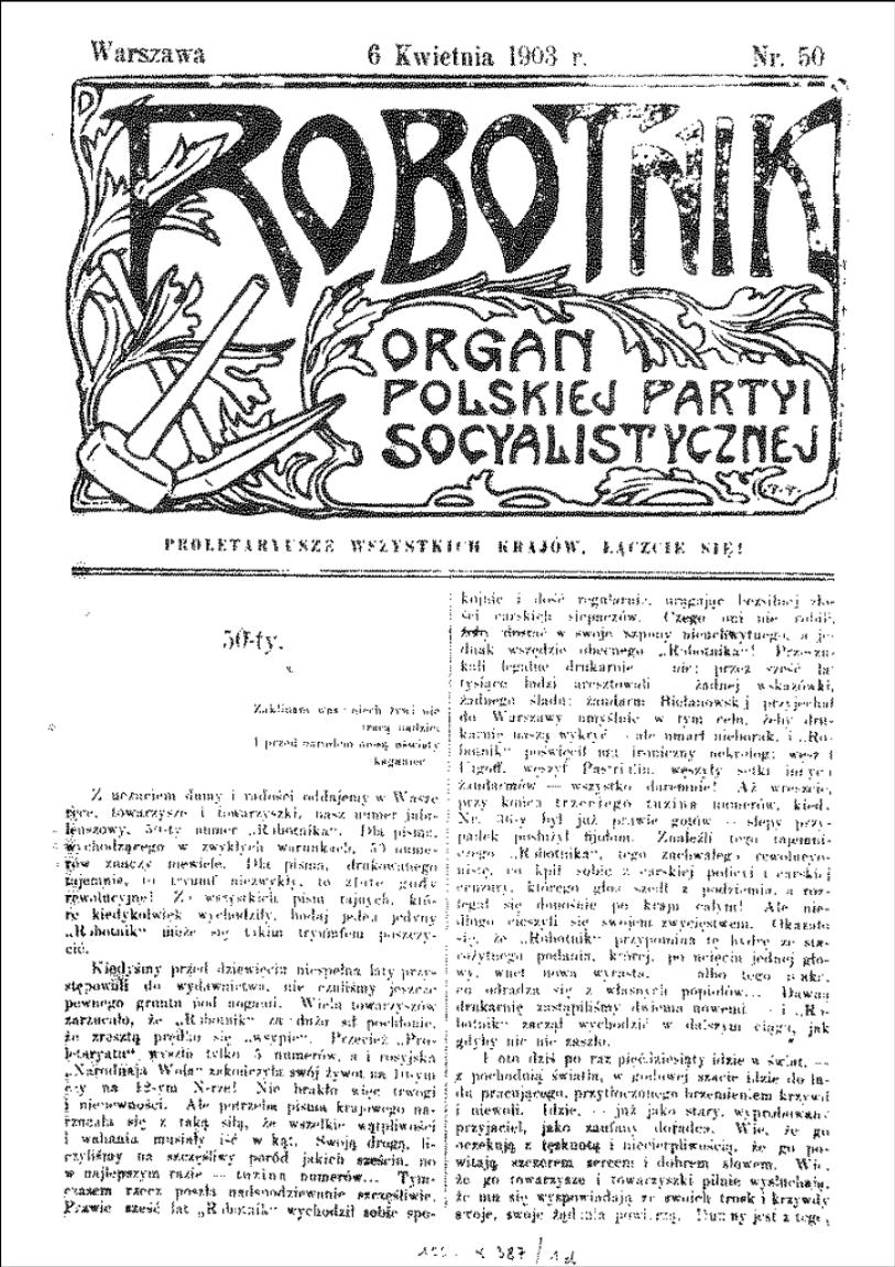 "Robotnik" PPS Nr 50 z 1903 r. (z winietą prawdopodobnie zaprojektowaną przez Teofila Terleckiego)